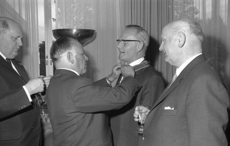 Empfang und Ordensverleihung an Bundestagsabgeordnete durch Bundestagspräsident Dr. Gerstenmaier Bonn (vorne v.l.n.r.: Gerstenmaier, Dr. Mommer)